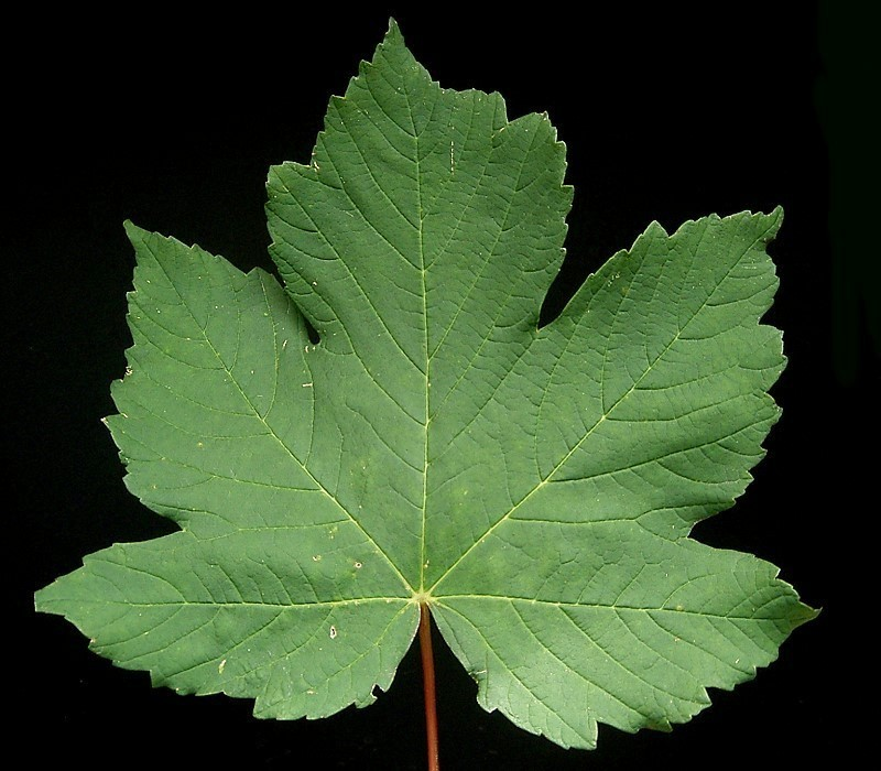 Acer pseudoplatanus